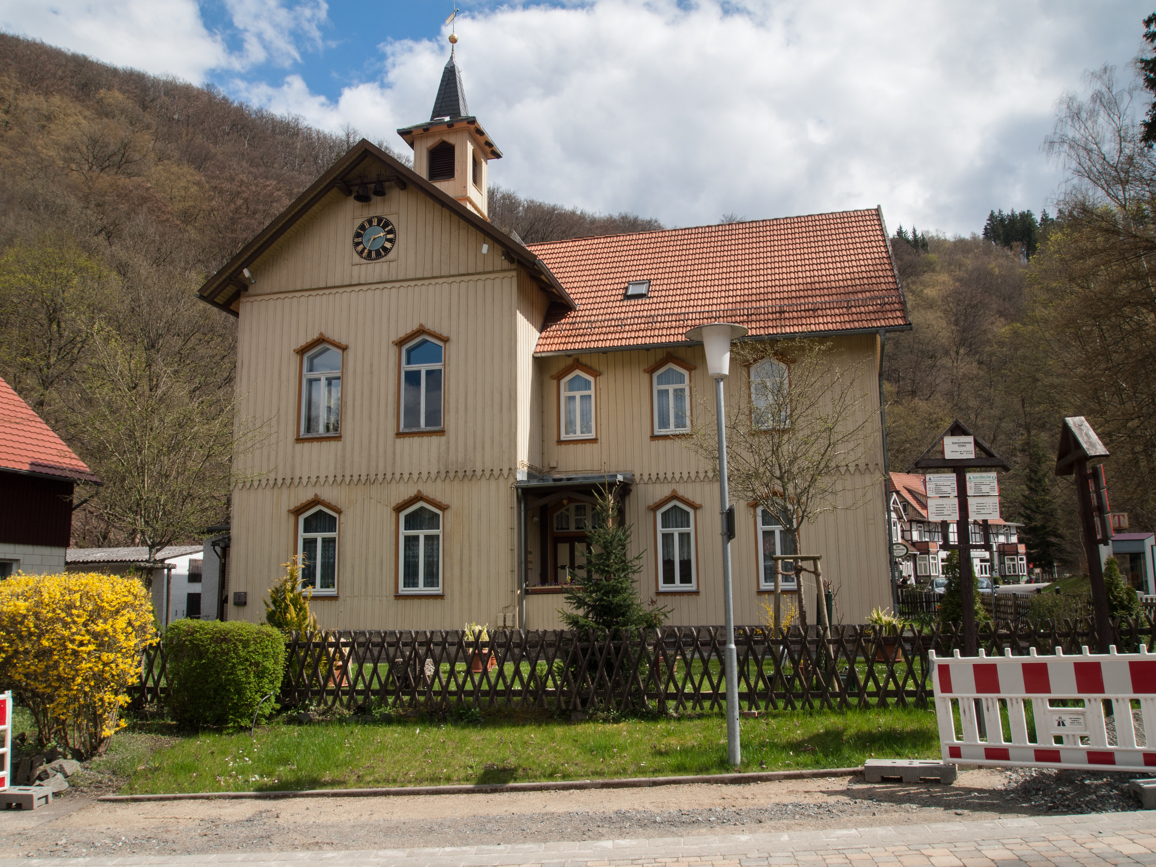 Treseburg (Stadt Thale, Landkreis Harz; Sachsen-Anhalt) Kirche und ehemalige Schule des Dorfes